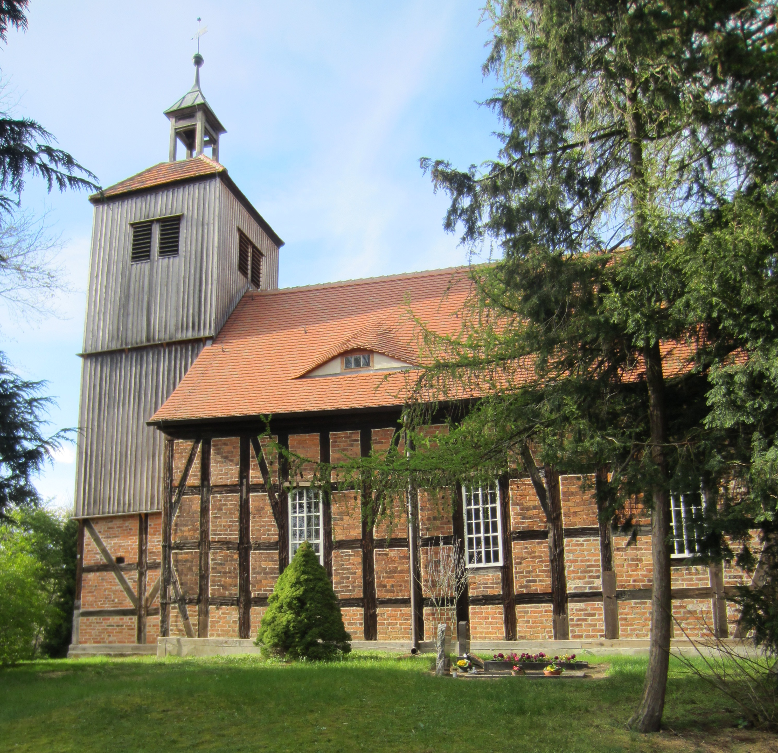 Falkenberg/Elster, Ortsteil Kleinrössen, denkmalgeschützte Fachwerkkirche, Ansicht von Südosten